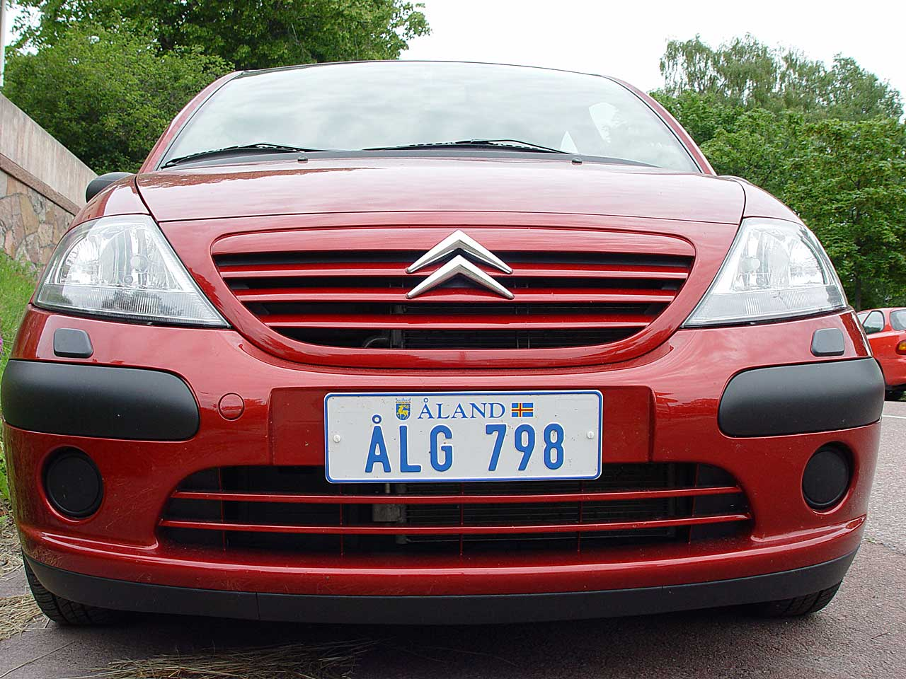 Åland. Kfz-Kennzeichen fotografiert in Mariehamn